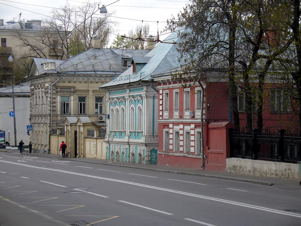 Zalogina Estates in Nikoloyamskaya Street, Moscow